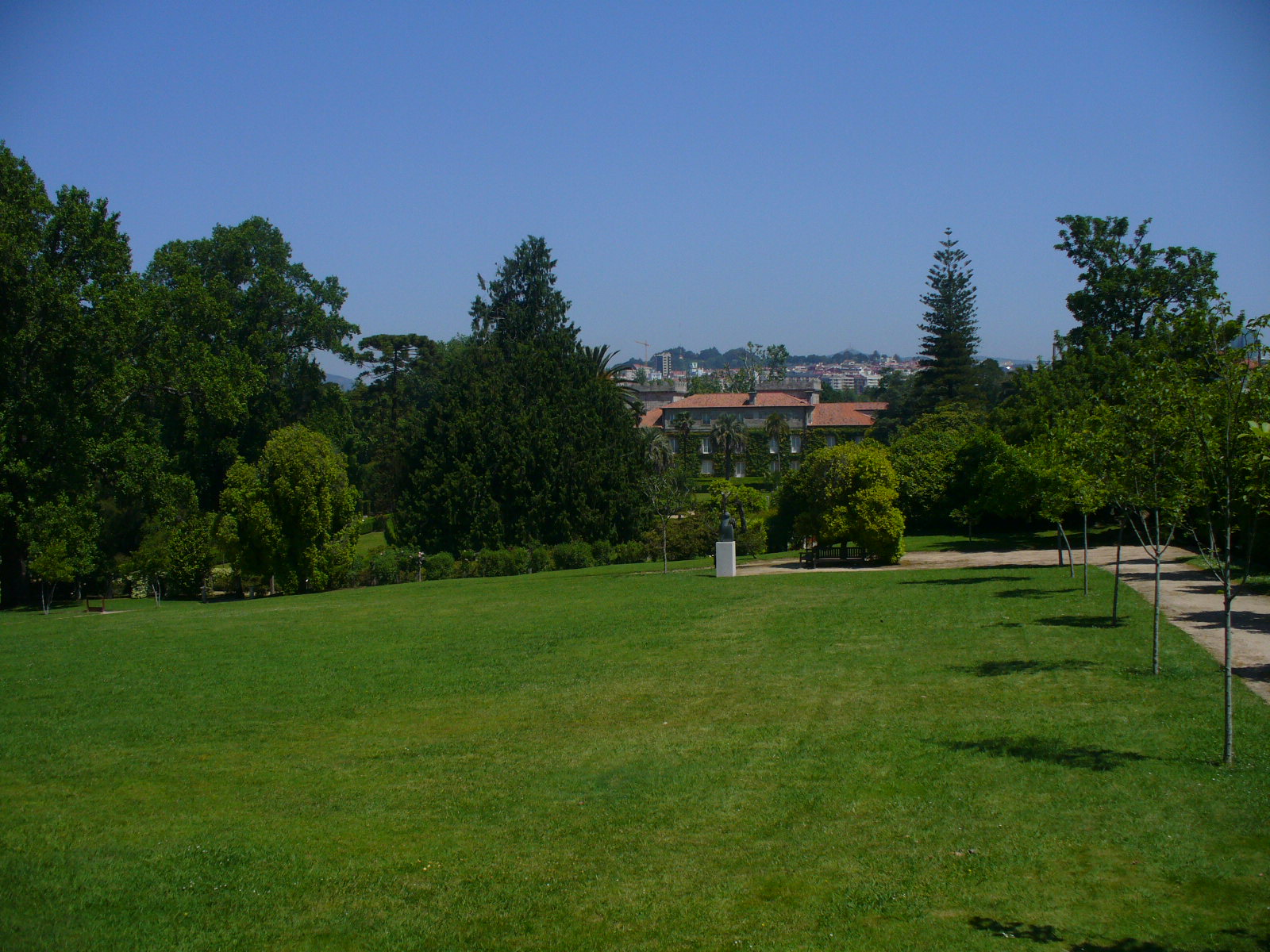 Herbejo